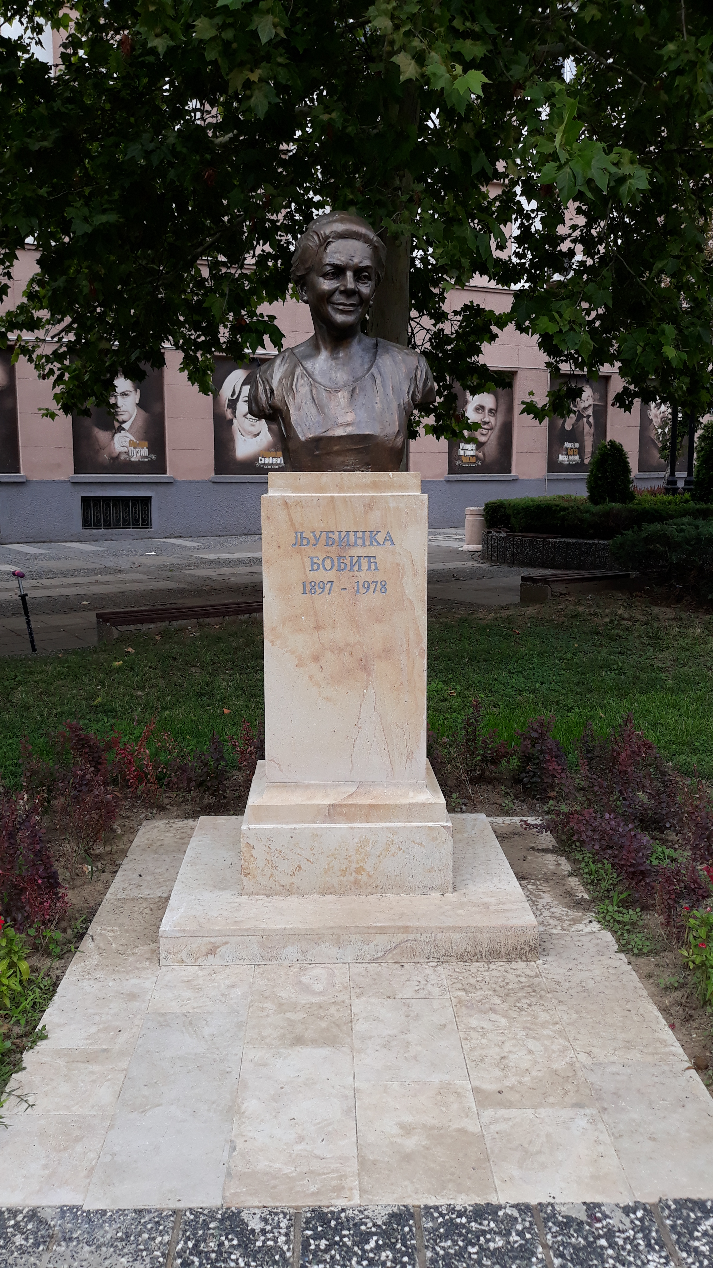 Бисте крушевачким глумцима испред зграде Културног центра у том граду.